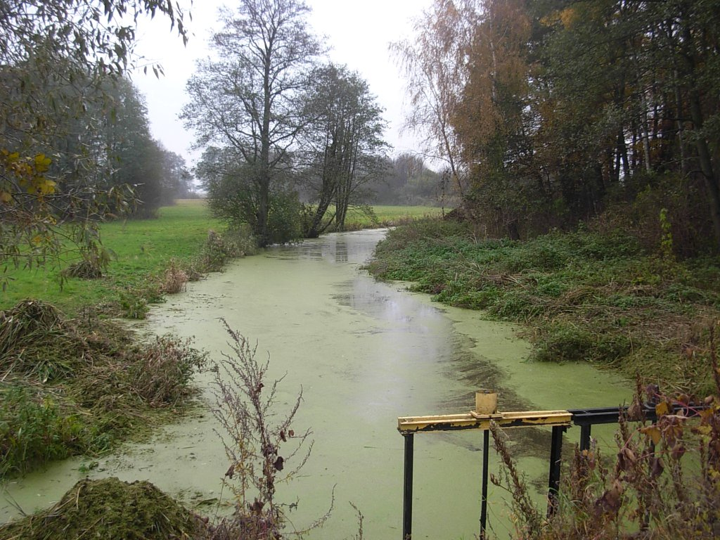 Kanał Notecki w pobliżu rezerwatu przyrody Dziki Ostrów